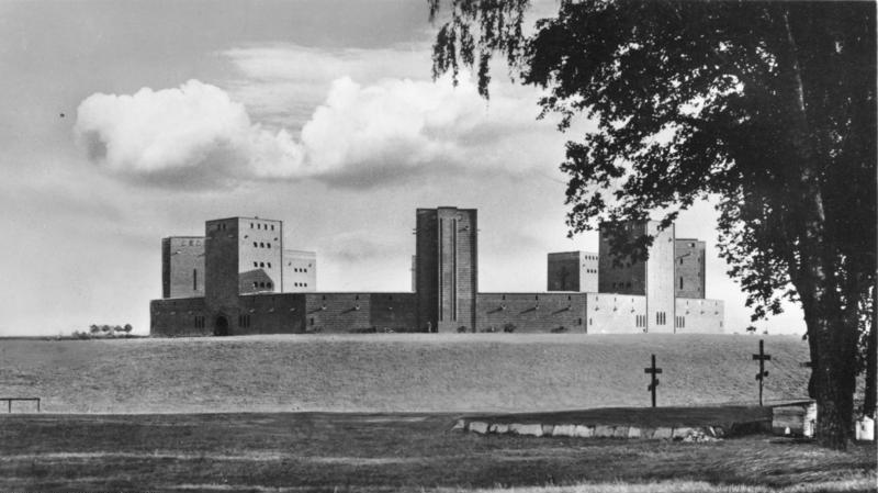 Reichsehrenmal Tannenberg, Hohenstein, Ostpr.